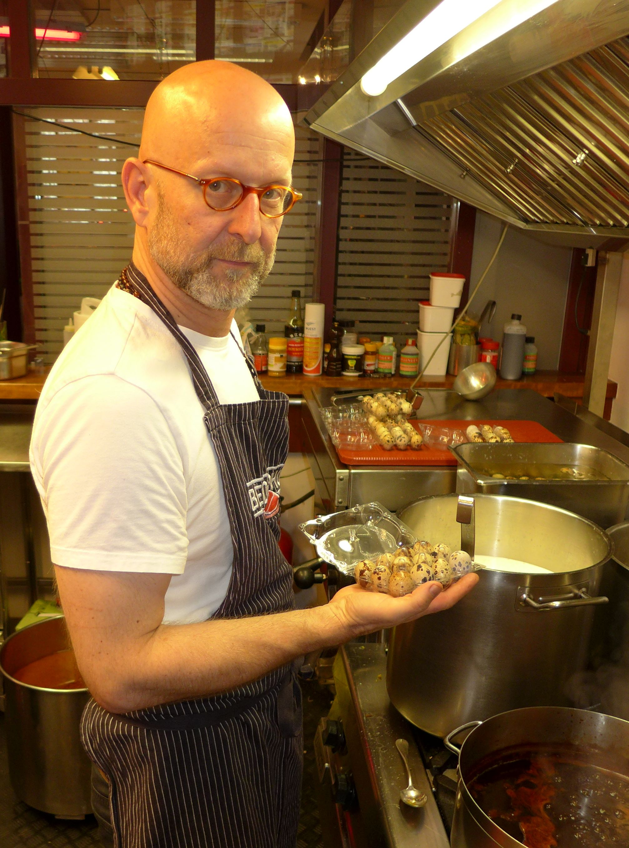 Fernsehkoch Erik Haemmerli kocht in einem Pop-up Lokal in einer ehemaligen Bank am Helvetiaplatz in Zürich.